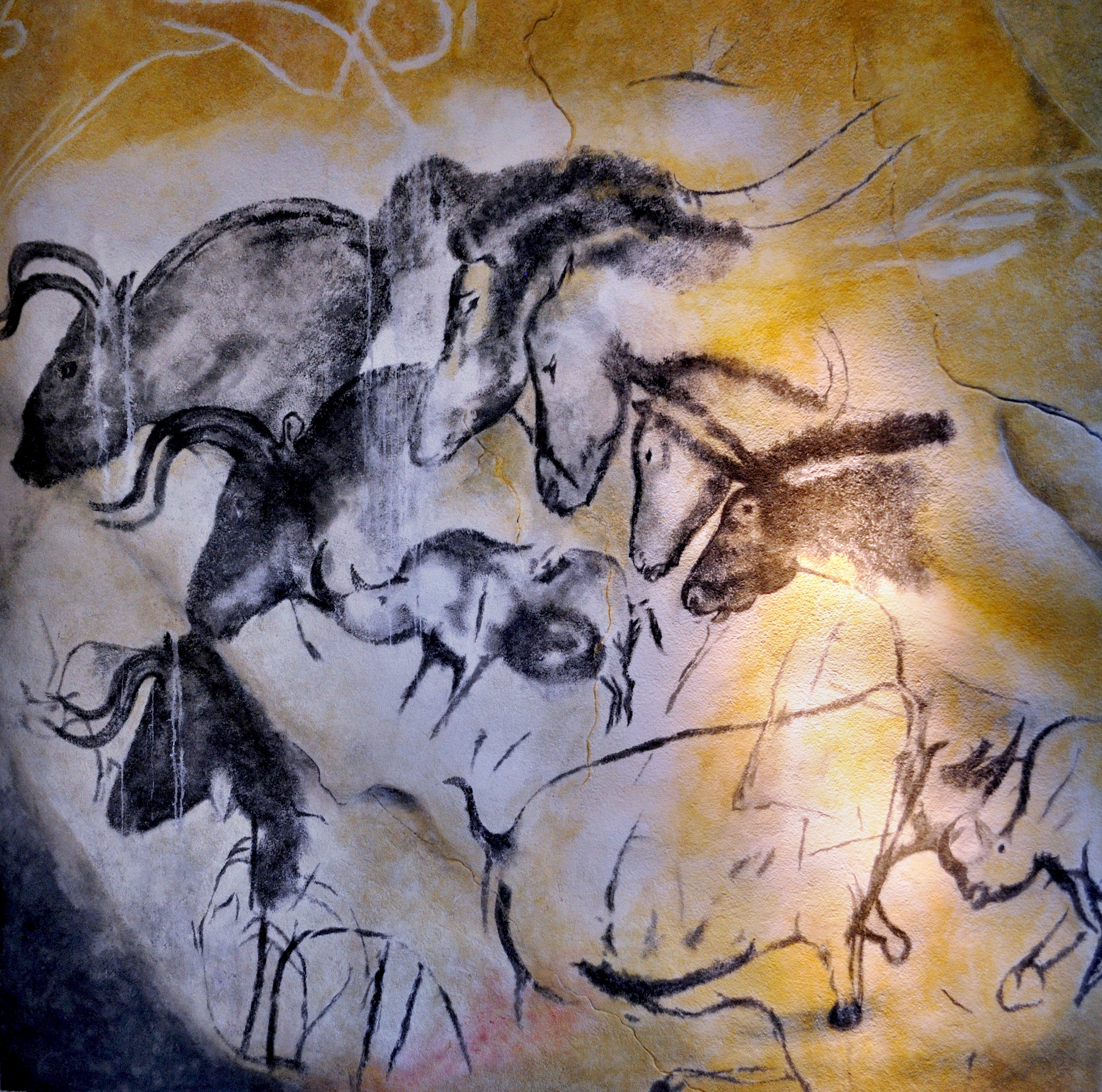 aurignacien, 31.000 yo